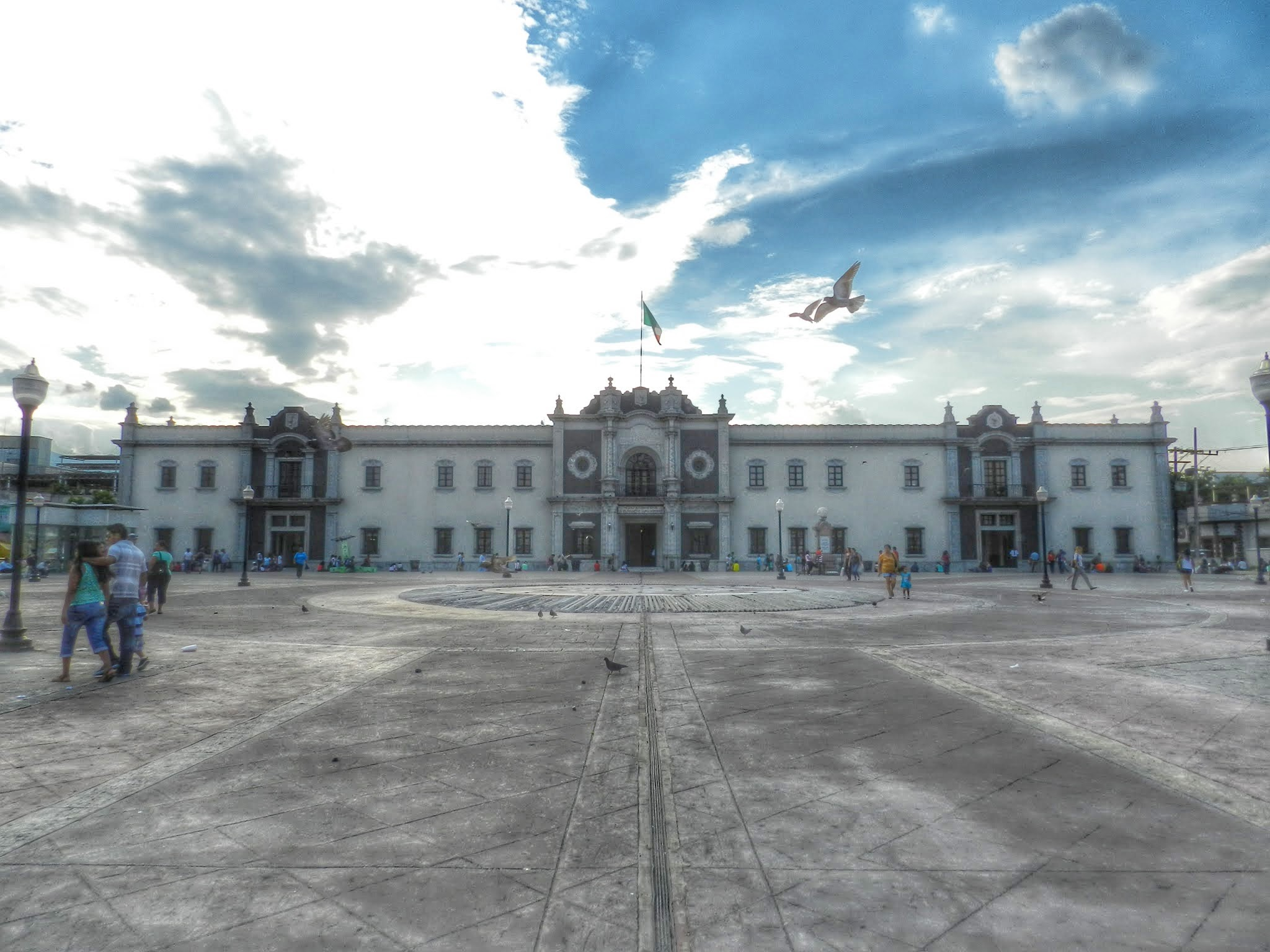 Preparatoria No. 1 y No. 3 UANL